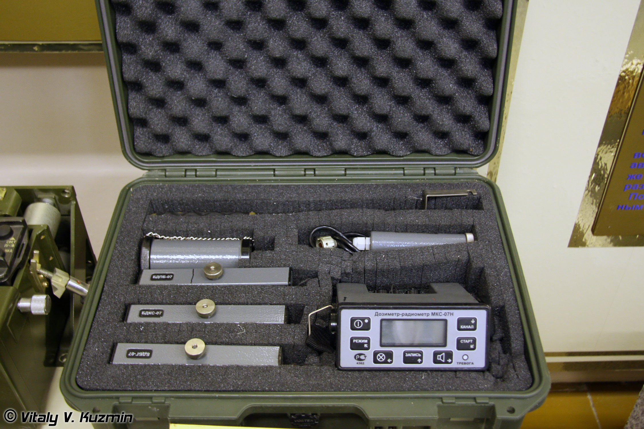 Измеритель мощности дозы ИМД-7 (IMD-7 radiation dose measuring device)